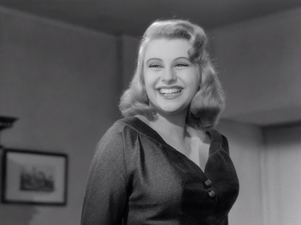 Screenshot dal film Accadde al commissariato (1954)